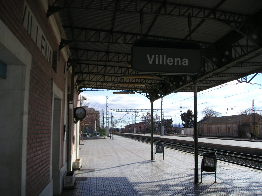 Estación de Adif (antes de RENFE), fotografía que mira hacia el sur, dirección Alicante.